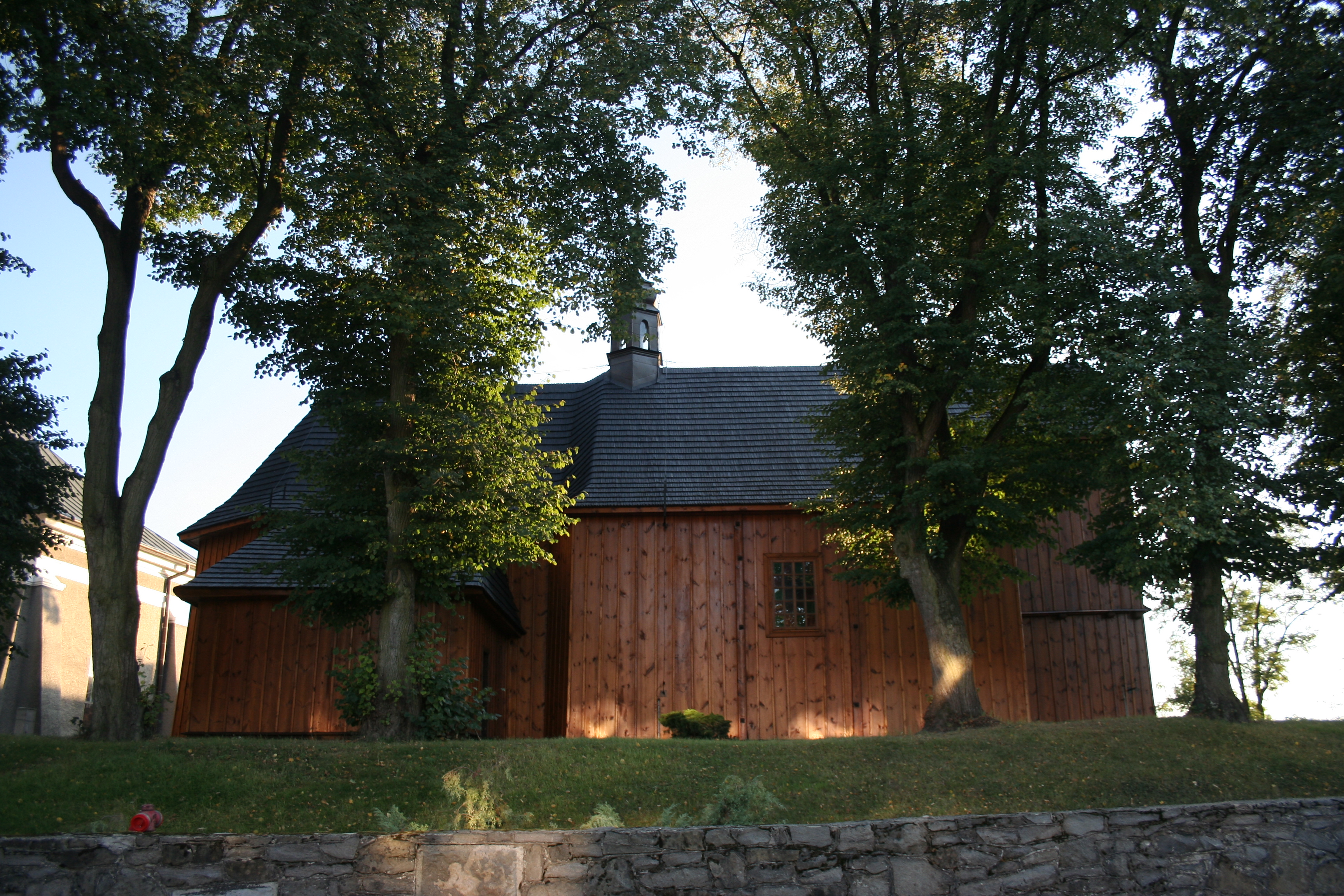 Annopol, ul. Kościuszki 2 - kościół parafialny p.w. śś. Joachima i Anny (drewn., XVIII w.)Cmentarz kościelnyzabytek nr A/99 z 30.11.1966 i z 24.02.1977